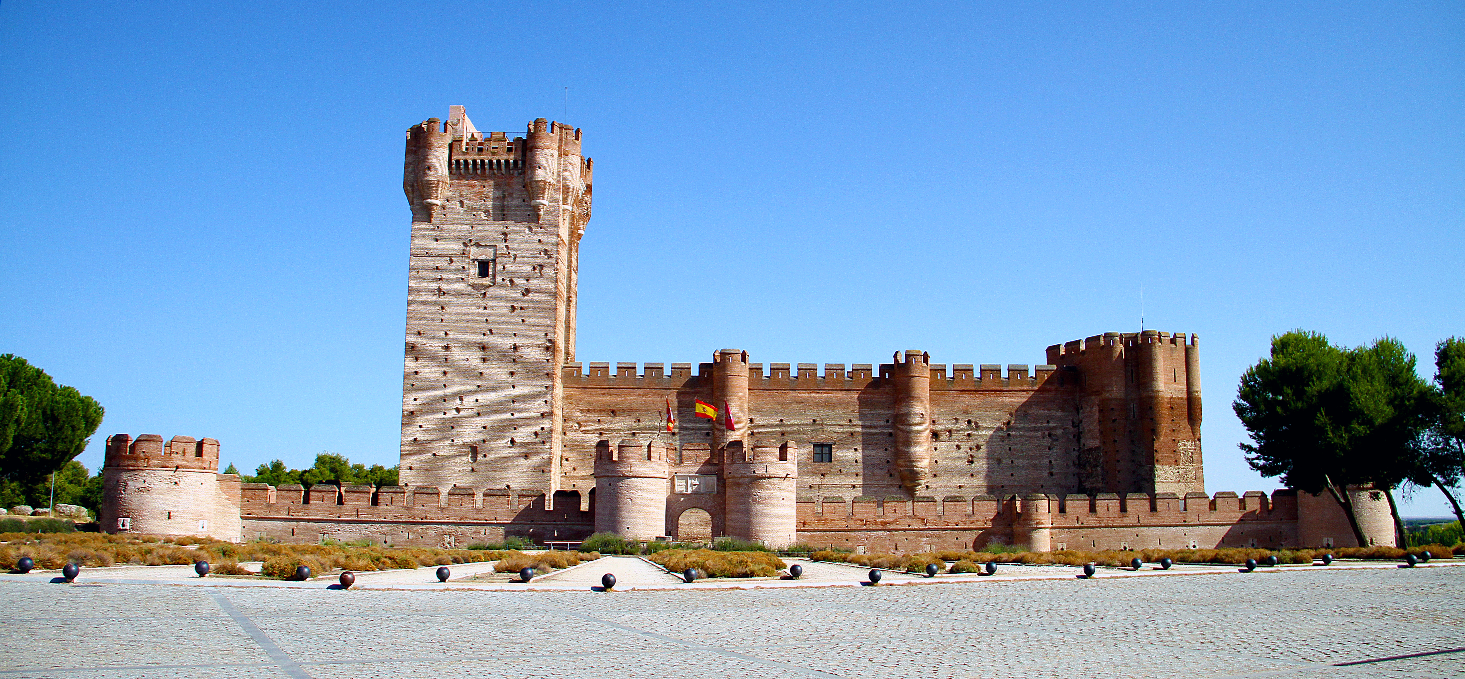 Fotografia del Castillo de la Mota, de Medina del Campo en Valladolid. Realizada por José María Rodríguez Martín (Chefo)